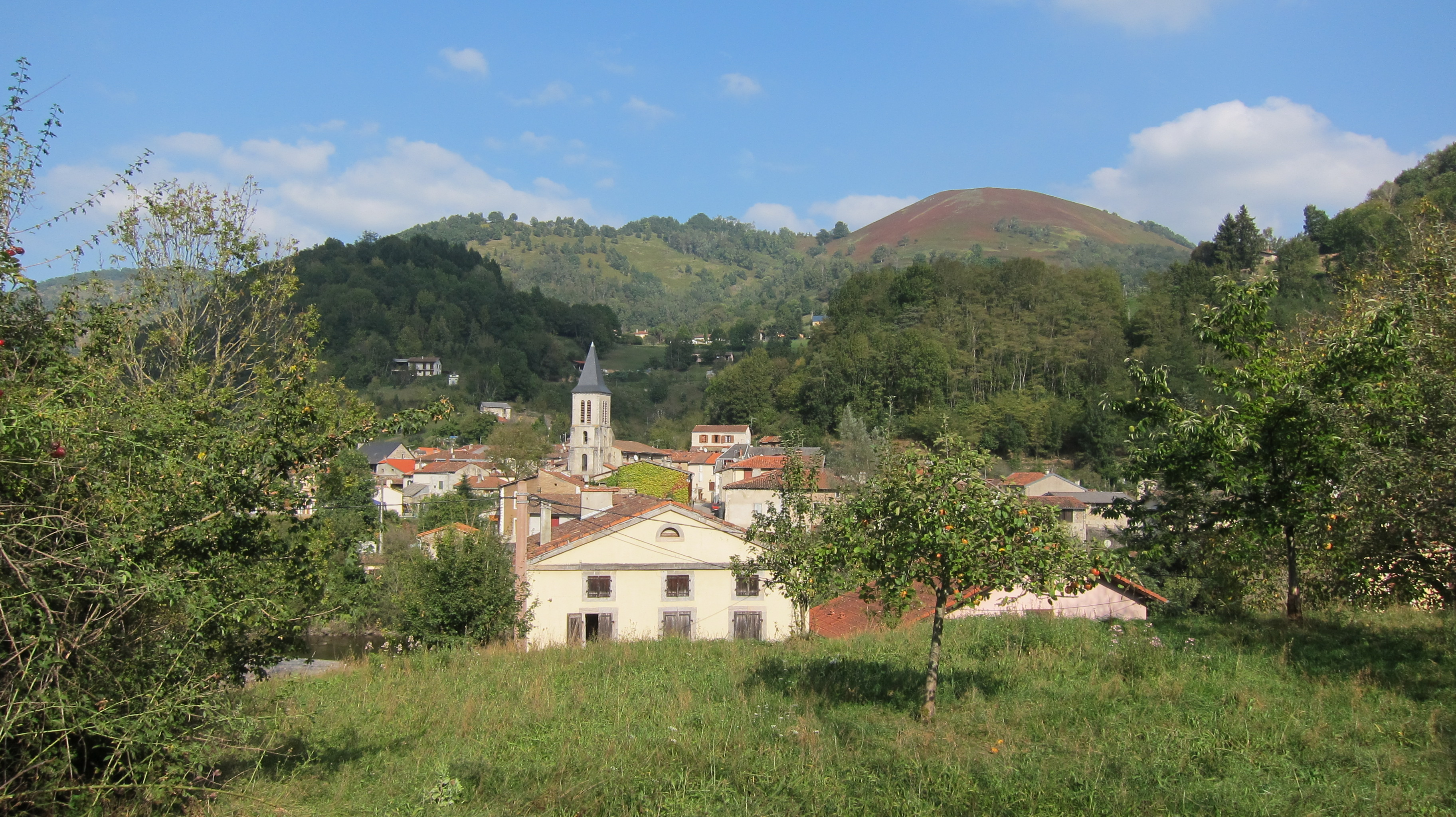 Lacourt (Ariège, France) : Vue du village depuis un verger.